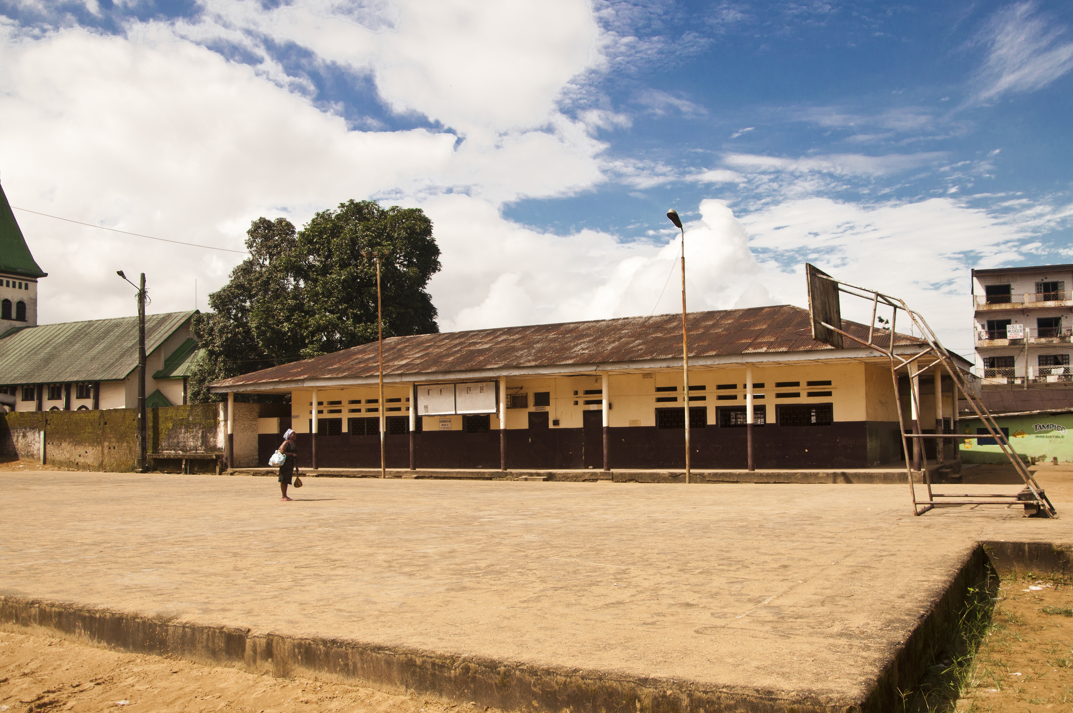 Intérieur college saker